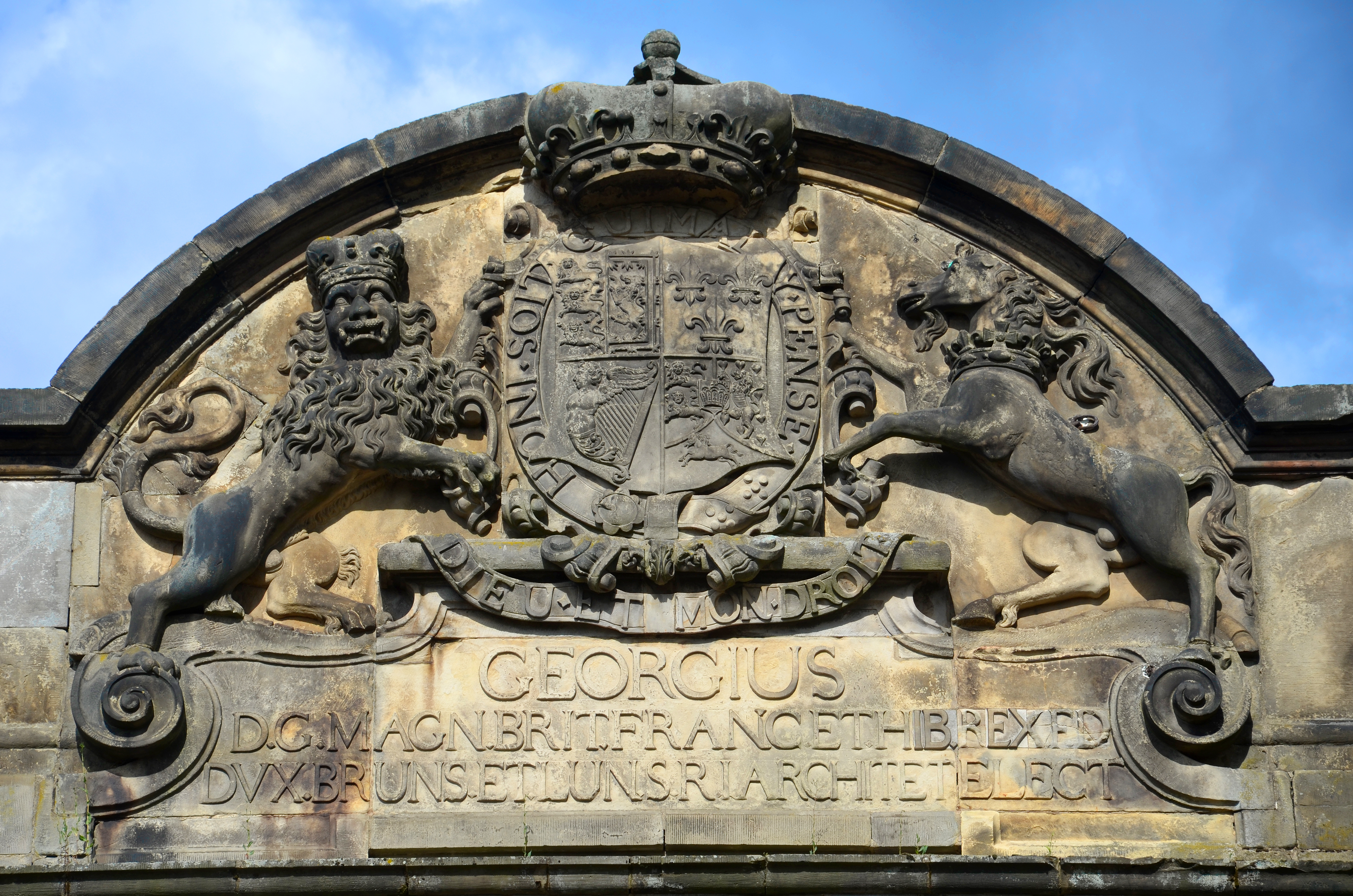 Das Staatswappen von Georg I. von König von Großbritannien und König von Irland, Titularkönig des Königreichs Frankreich, Kurfürst von Braunschweig-Lüneburg, gehalten von einem Löwen unter der Krone des Marstalltors in Hannover, am Hohen Ufer als Durchgang zur Straße Roßmühle ...